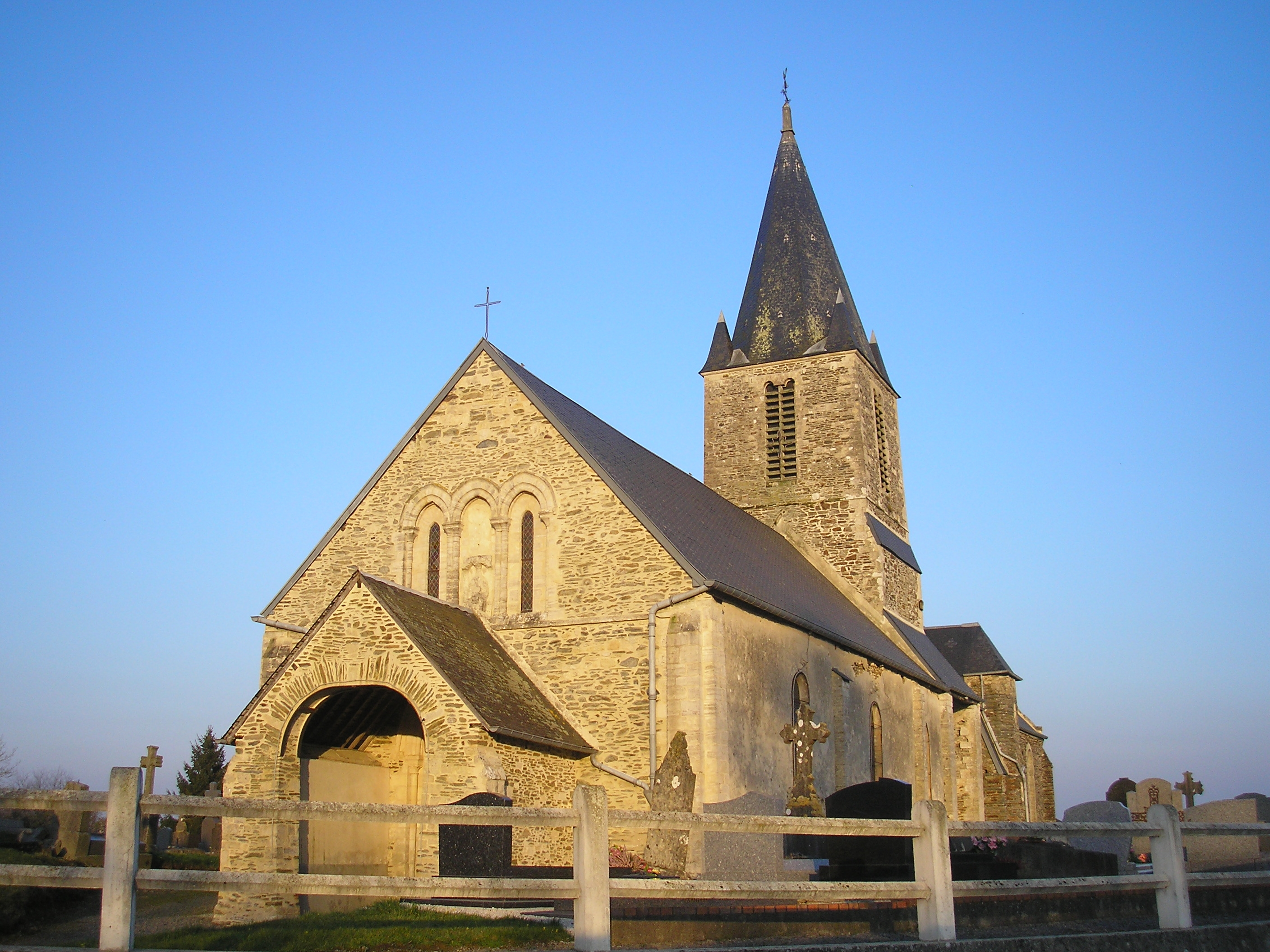 Litteau (Normandie, France). L'église Notre-Dame.